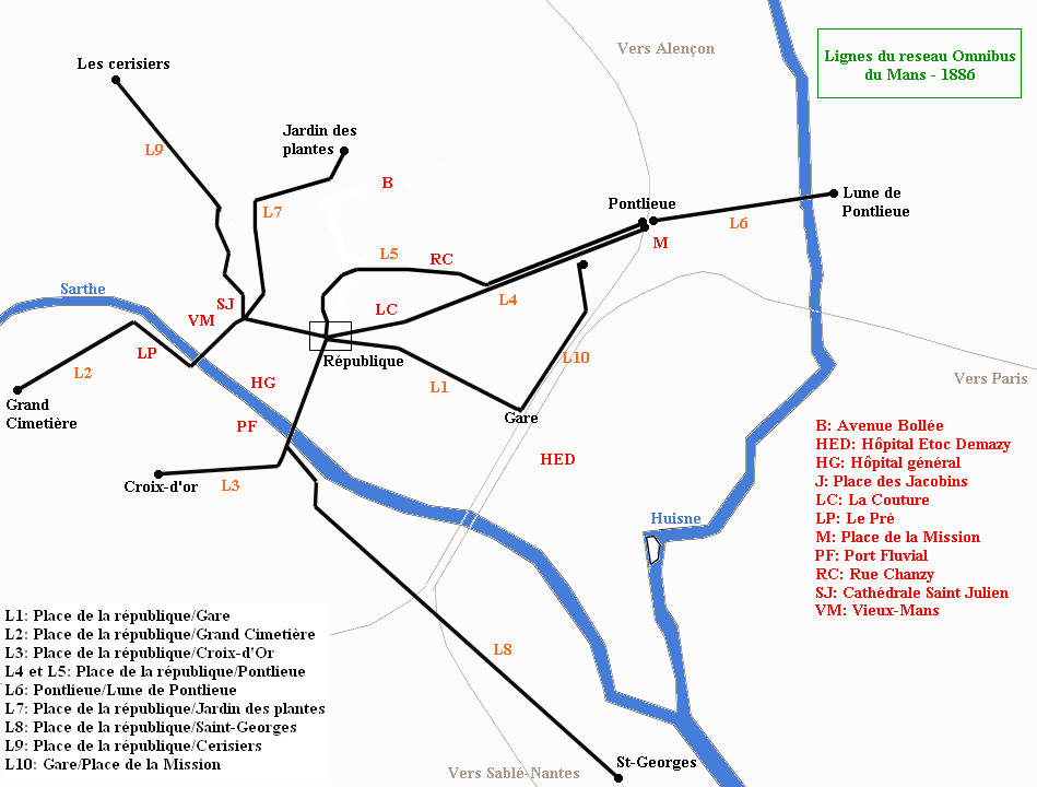 Reconstitution sur carte du reseau omnibus Routiou-Lenoir de la ville du Mans en 1886.